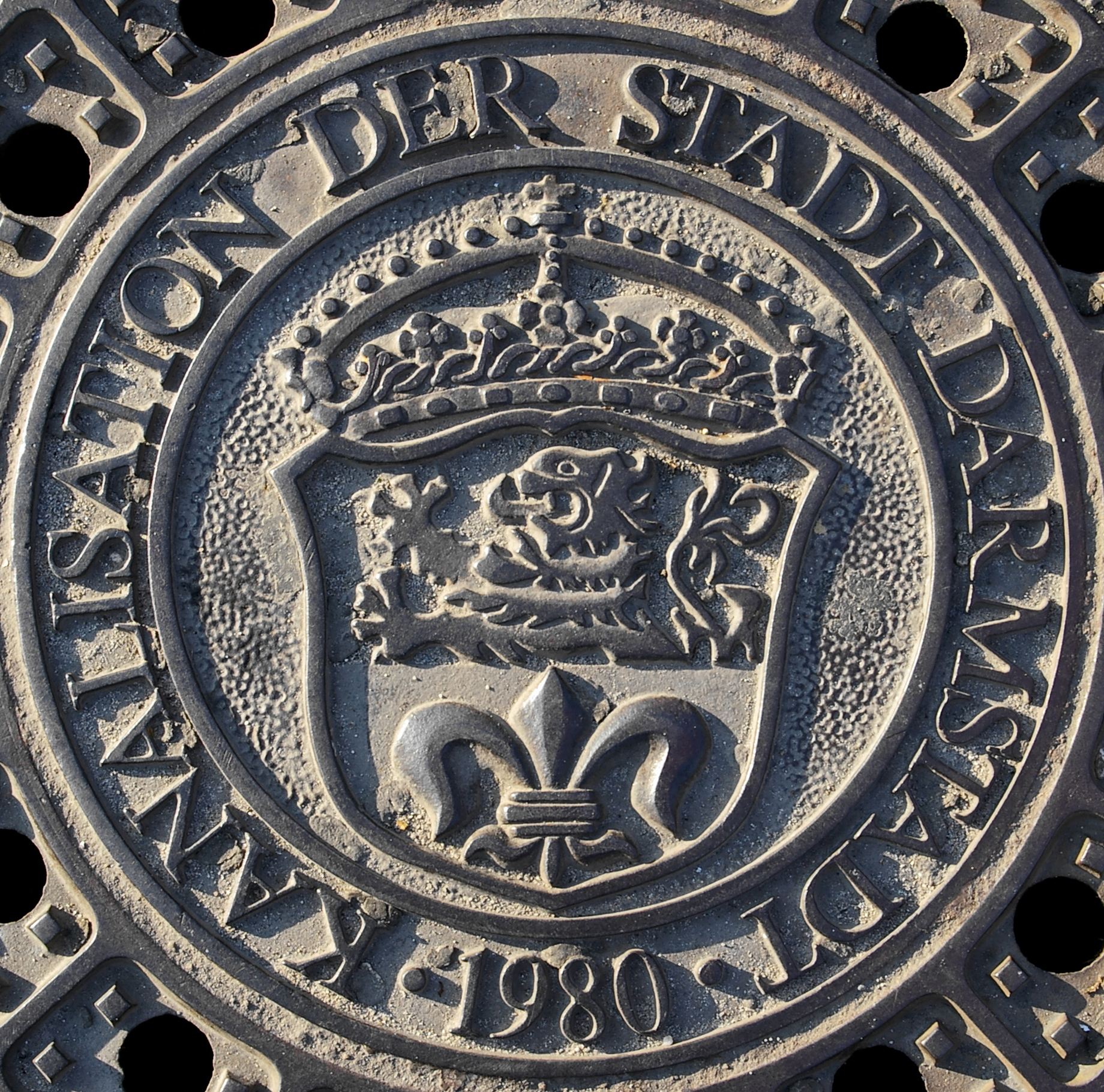 Gullideckel in Darmstadt vor dem Rathaus